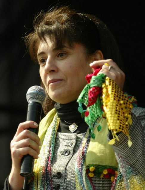 Leyla Zana (3ê Gulana 1961ê- ) siyasetmedareka Kurd e ko piştî sonda qanûnî li perlemana Tirkiyê, bi Kurdî axivt û ji ber wê û ji ber bizavên wê siyasî jibo doza Kurdî li Tirkiyê kevt girtîgehê. Ew sembola berxwedana aştîxwaz ya Kurdan li Tirkiyê ye. Li sala 1995ê, Parlementoya Ewropayê xelatê navdarê Saxarof Xelat da Leylayê, lê heta sala 2004ê ew ji ber zîndanîbûna xwe neşîya wî xelatî werbigirit.